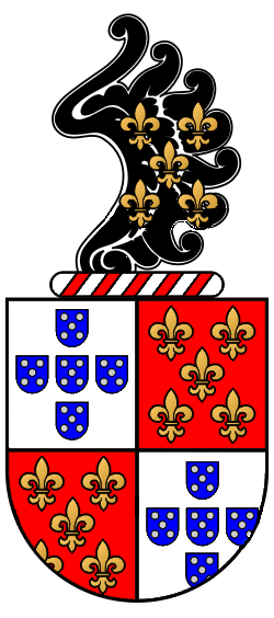 Brasão dos Albuquerques